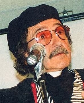 Baltimore M.D. 2000